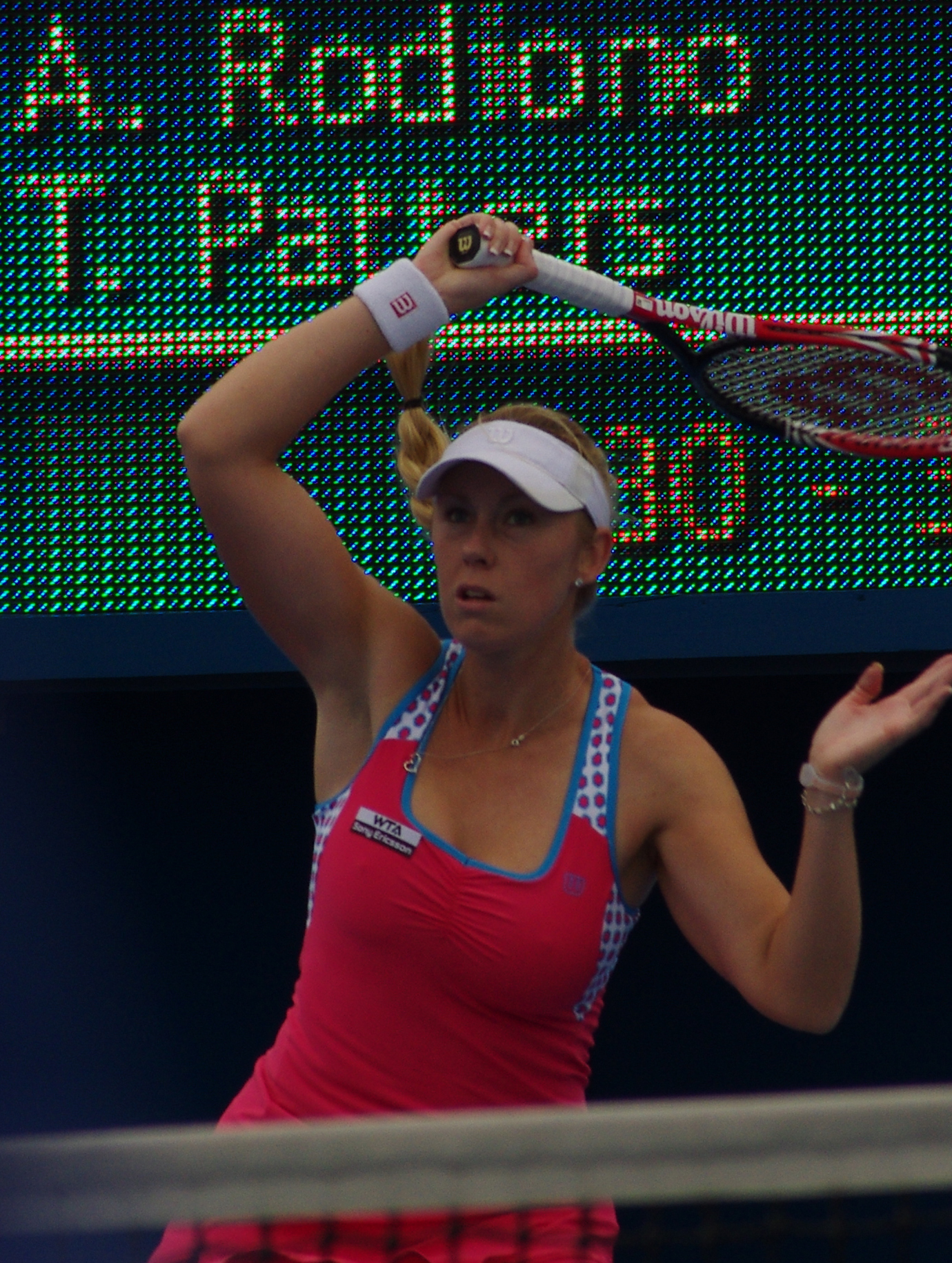 Tammi patterson